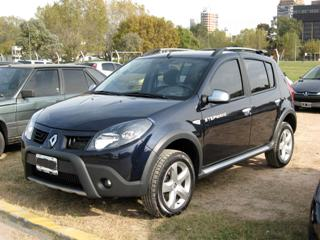 Renault Sandero Stepway frente + perfil.